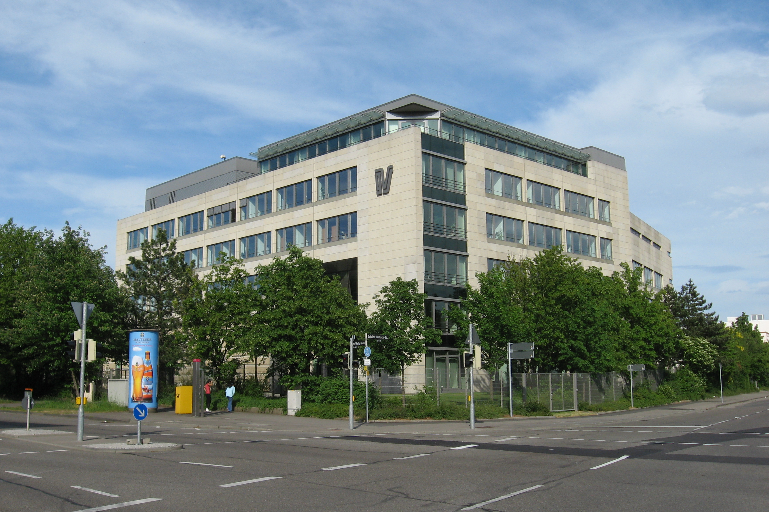 Zentrale der Gasversorgung Süddeutschland in Stuttgart-Möhringen